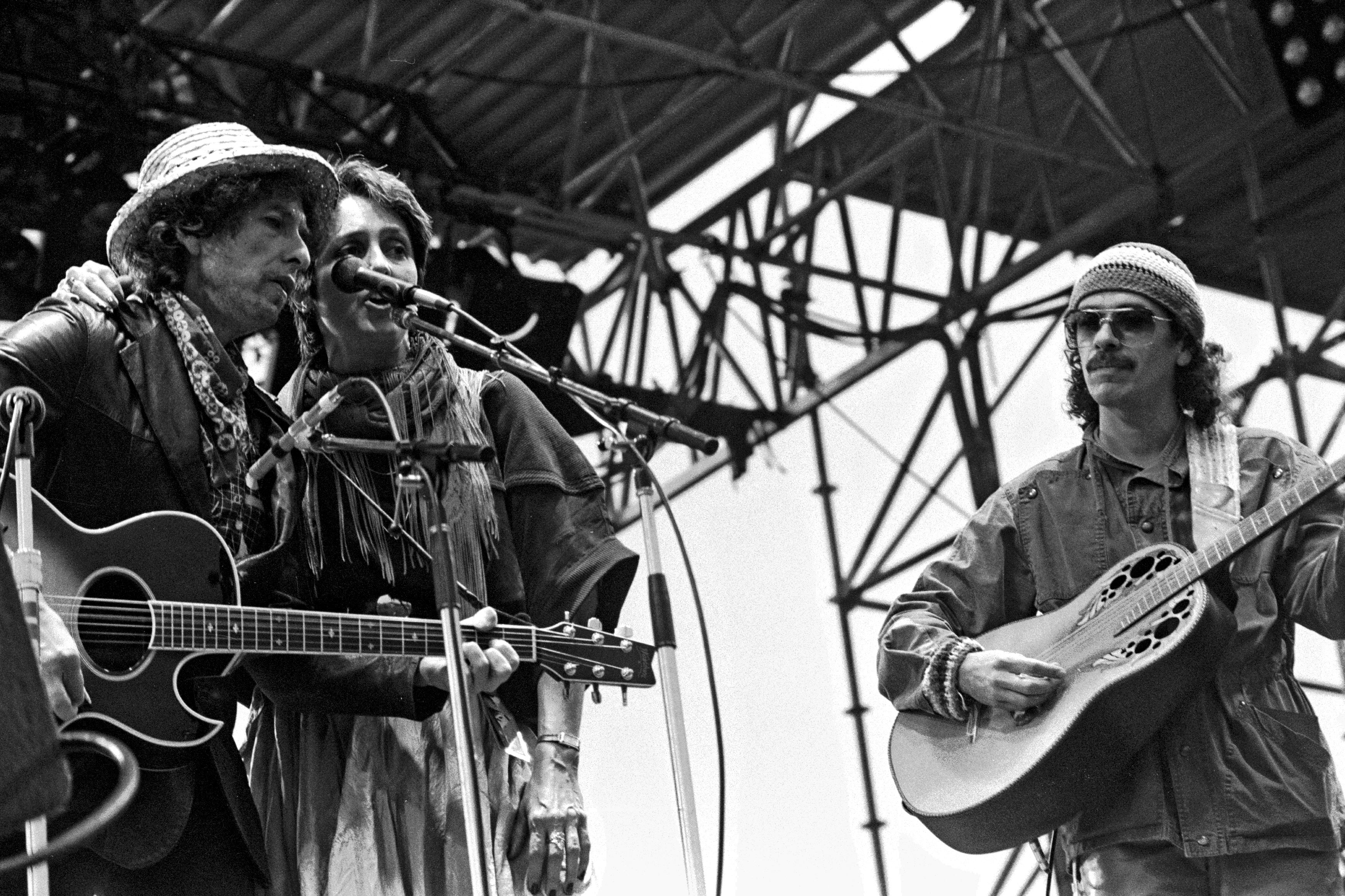 Einmalige Union von Bob Dylan, Joan Baez, Santana, Mai 1984, Hamburg